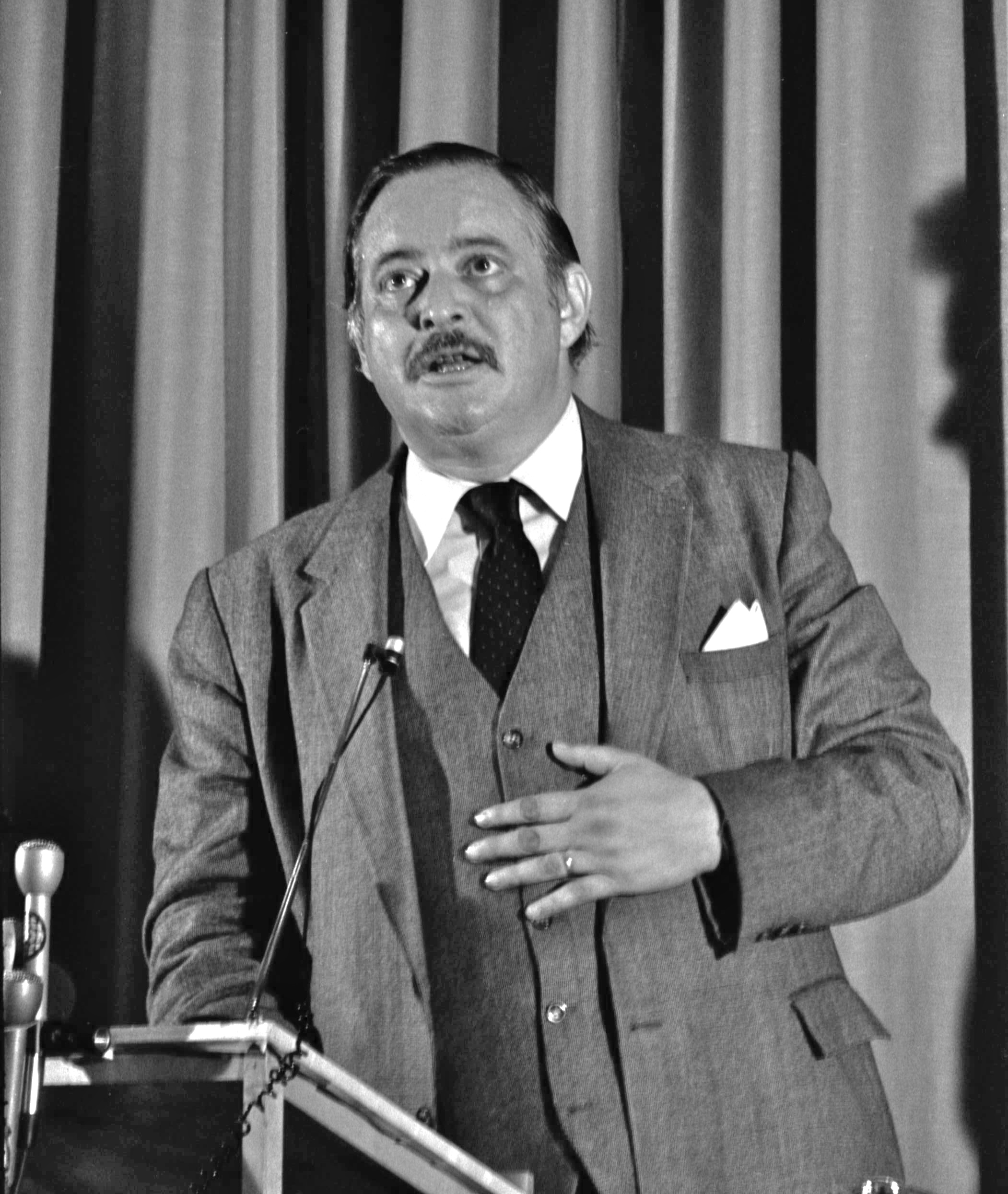 Jacques Parizeau, ministre des Finances, lors d'une conférence à l'université Laval